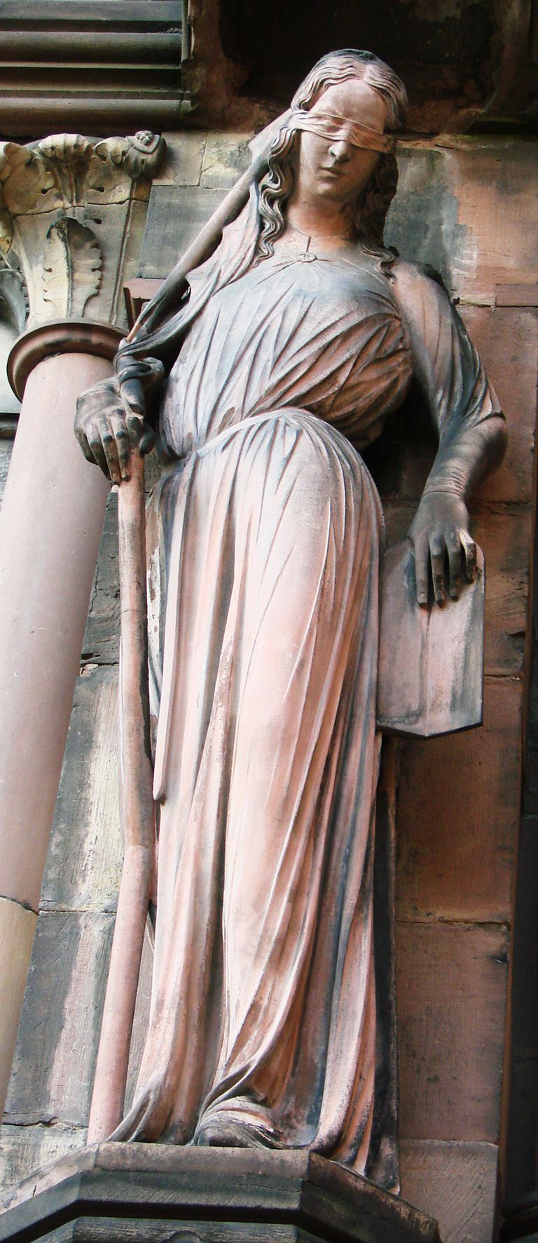 La Synagogue,cathédrale de Strasbourg.(Photo retouchée masquant les restaurations)